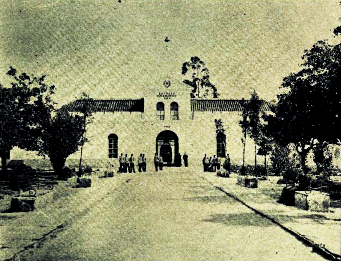 Primera sede de la Escuela Politécnica en el convento de la Recolección.